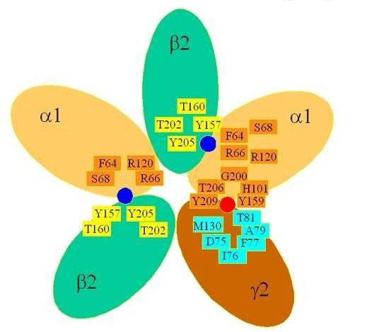 Места связывания ГАМК и бенздиазепинов на ГАМКА-рецепторе